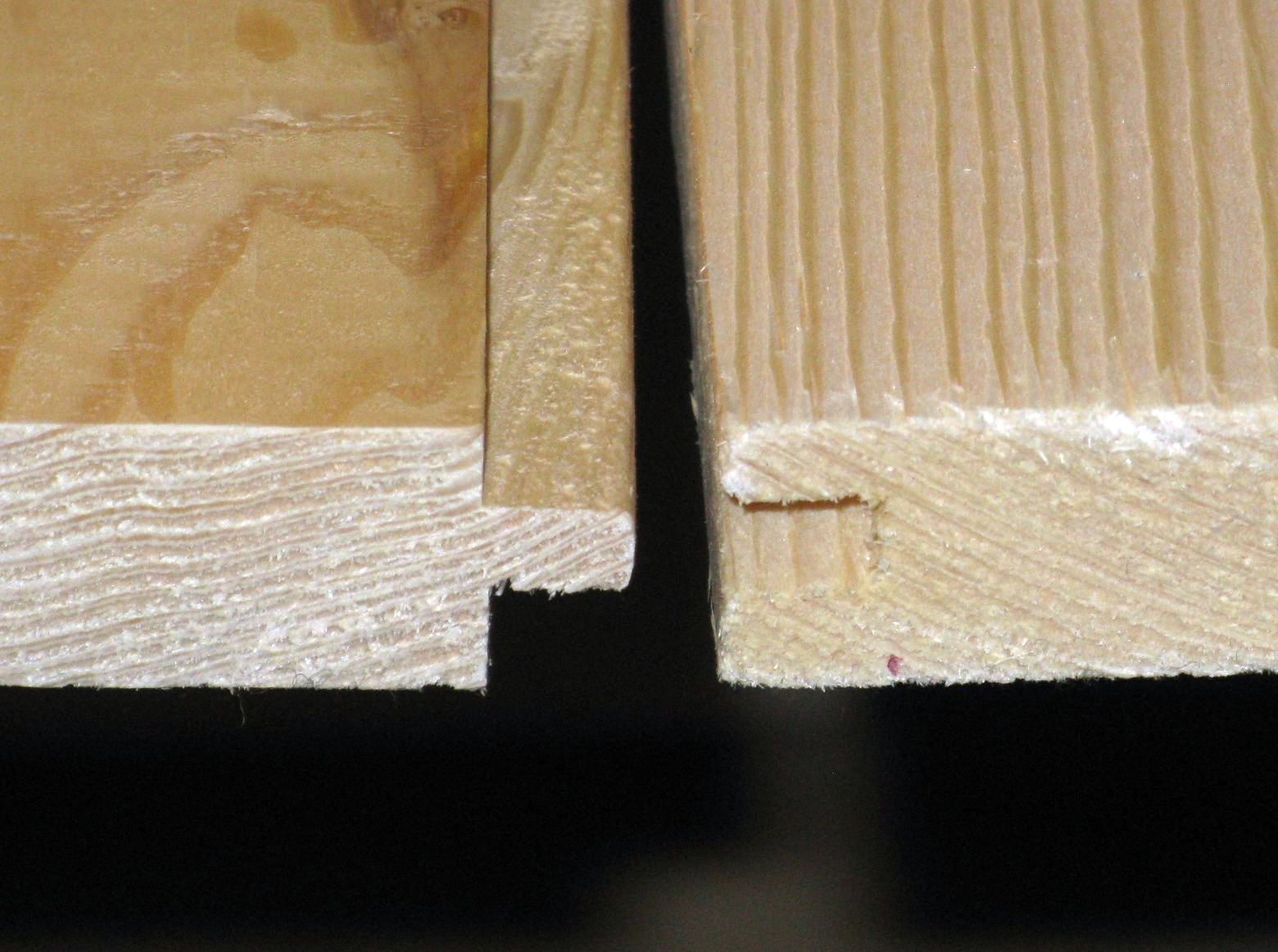 Verbindung zweier Bretter mit Spund und Nut